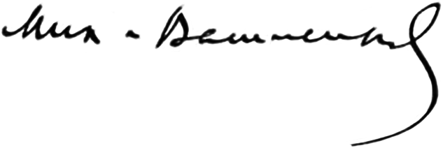 Роспись украинского учёного-историка Николая Василенко (1866–1935)